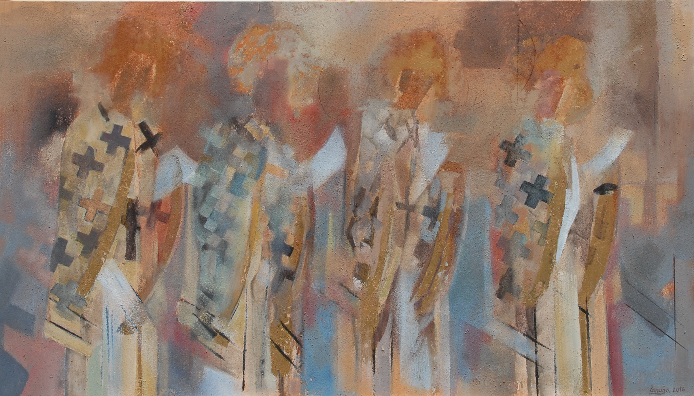 Slika Zoran Čalija